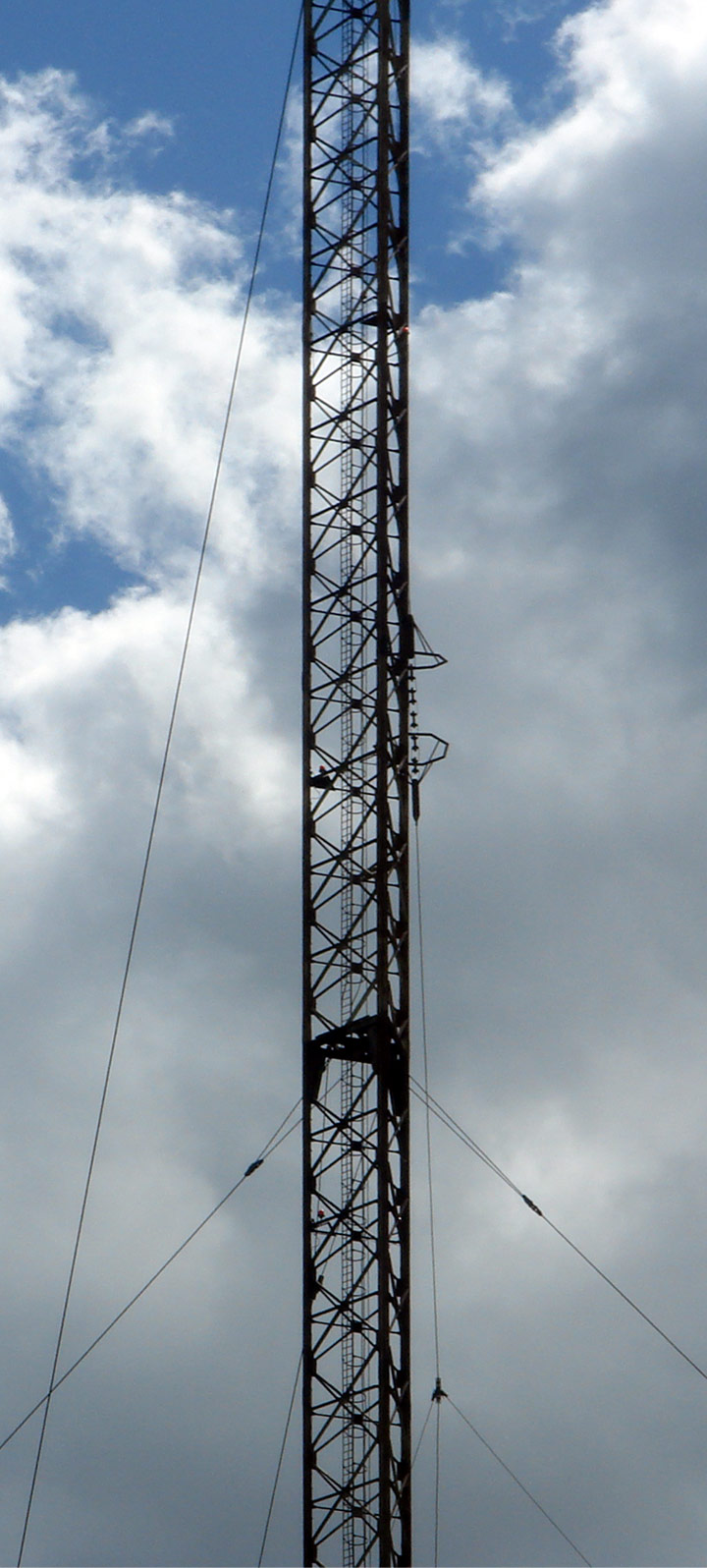 Мачта радиостанции «Голиаф».